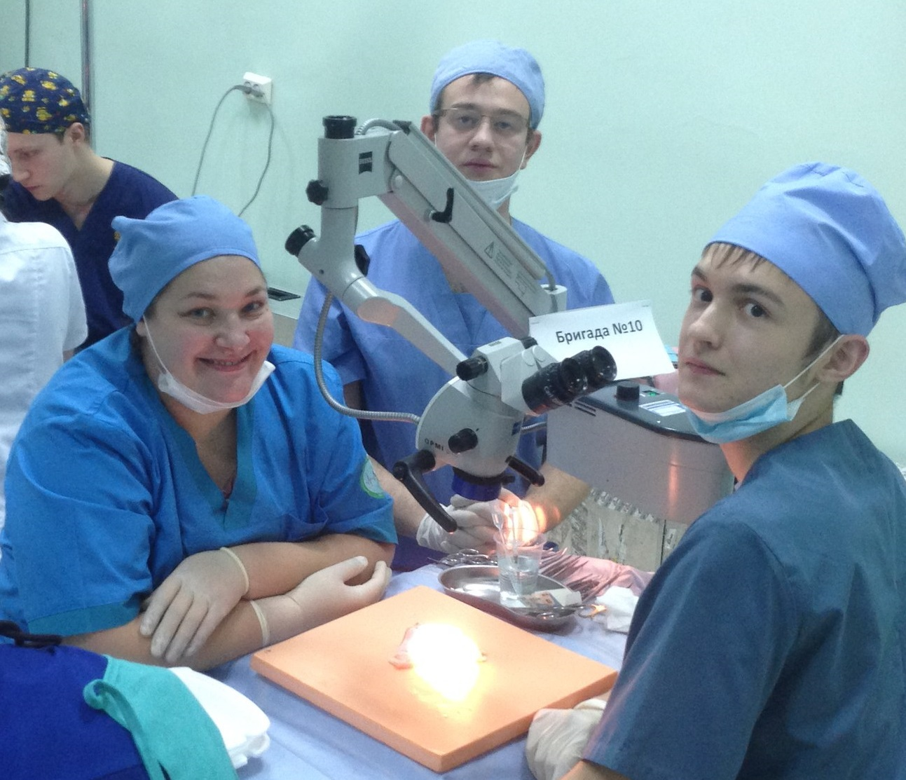 Студенты ТГУ Державина